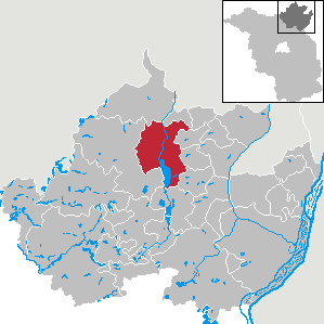 Prenzlau in Brandenburg (Country) - District Uckermark